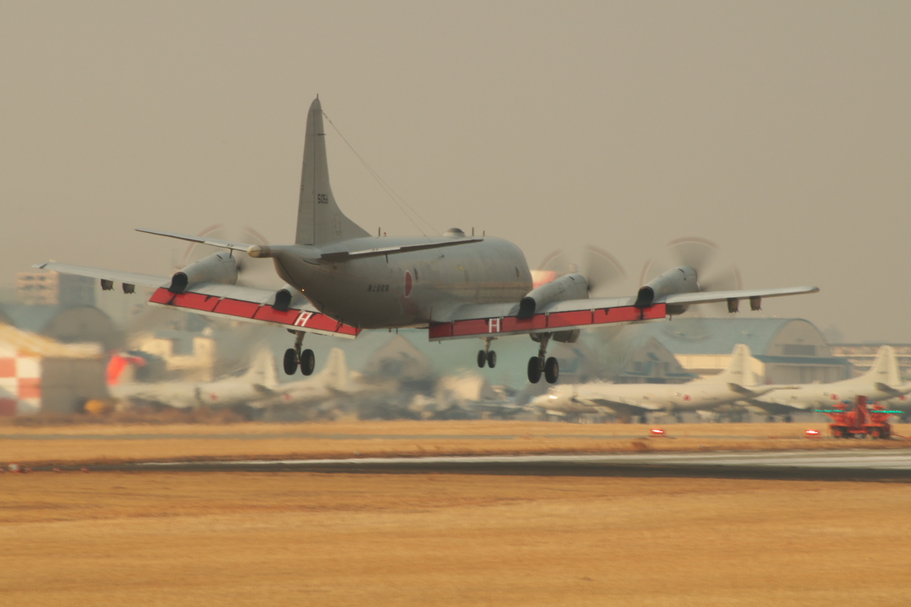 海自のP-3Cを後ろから。